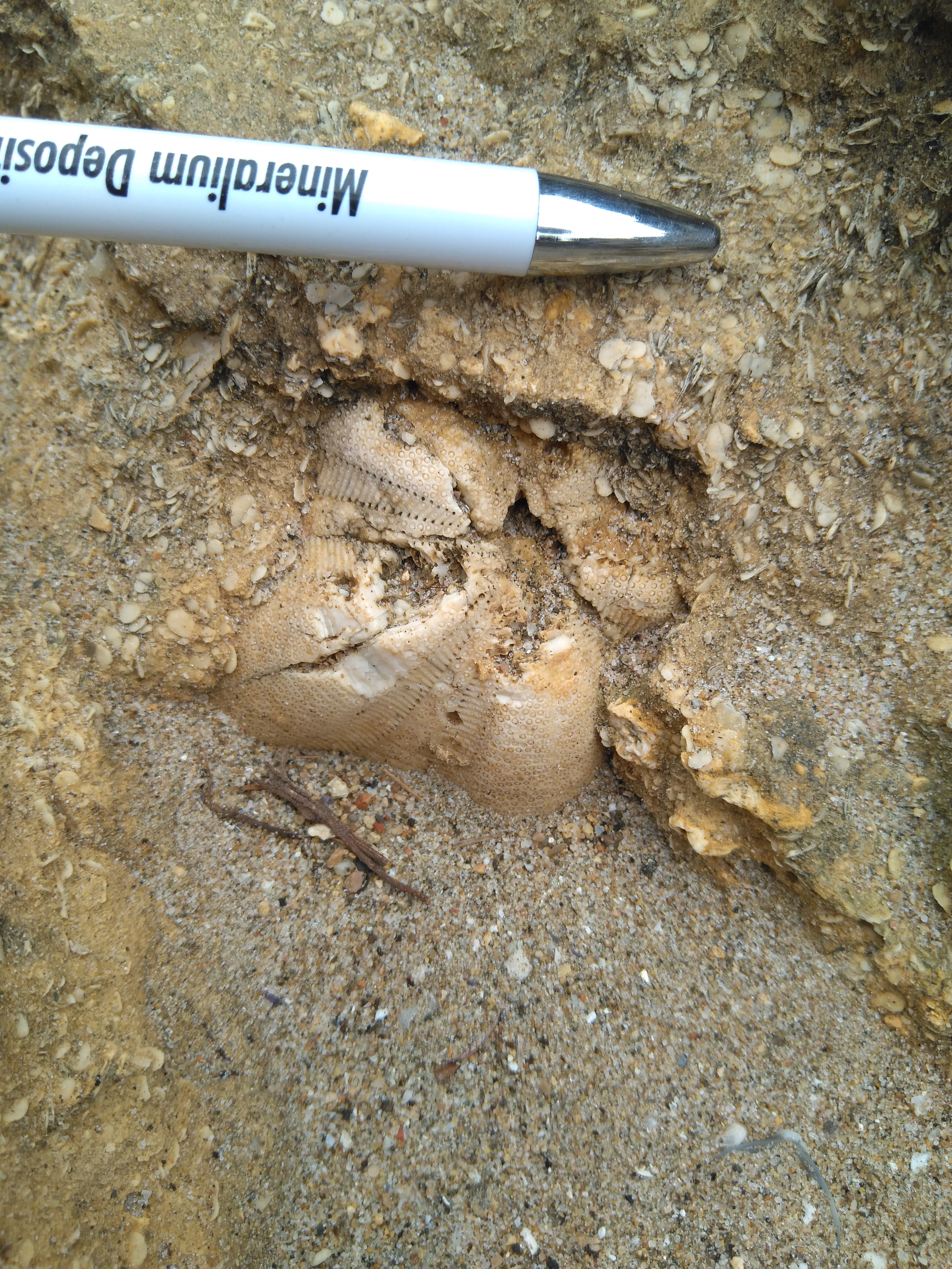 Clypeaster sp. del Miocè de Tarragona